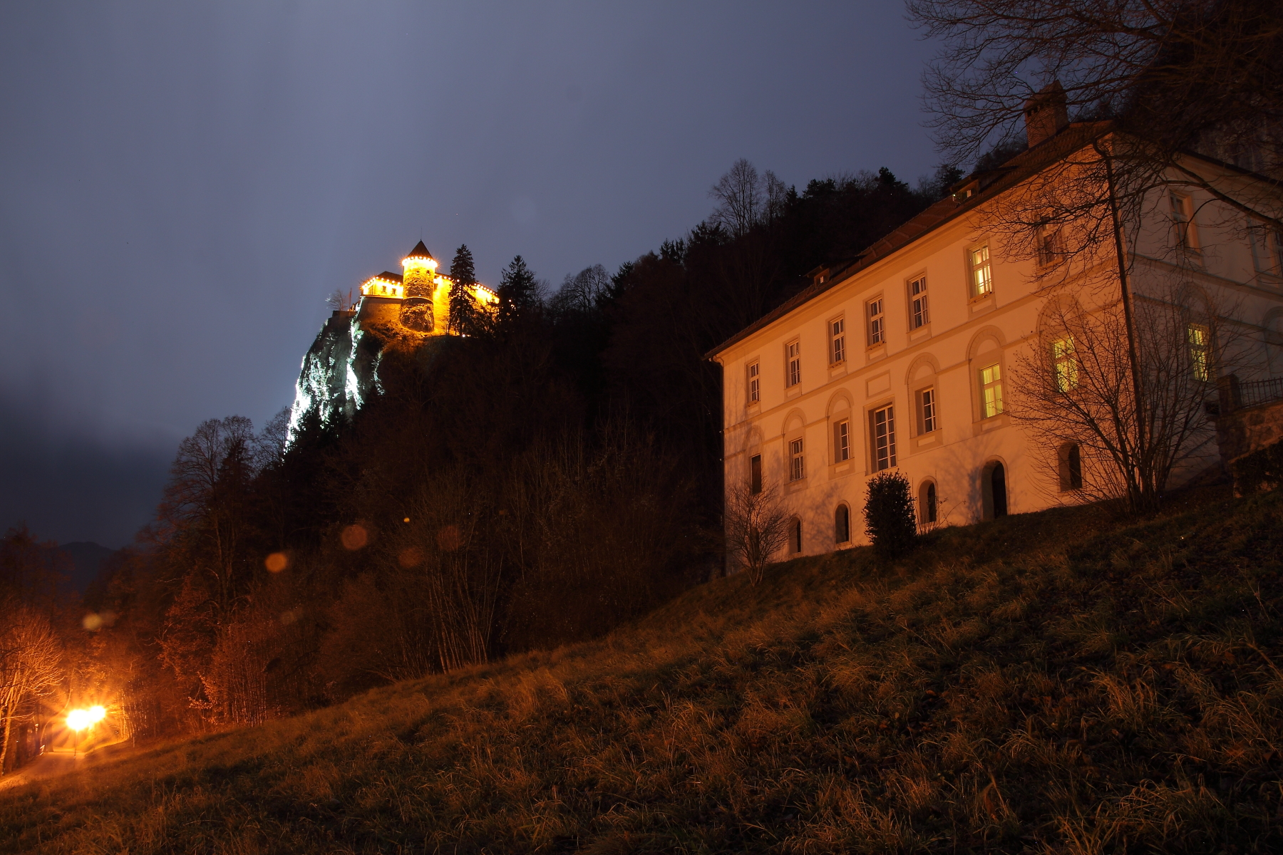 Blejski grad in župnišče.